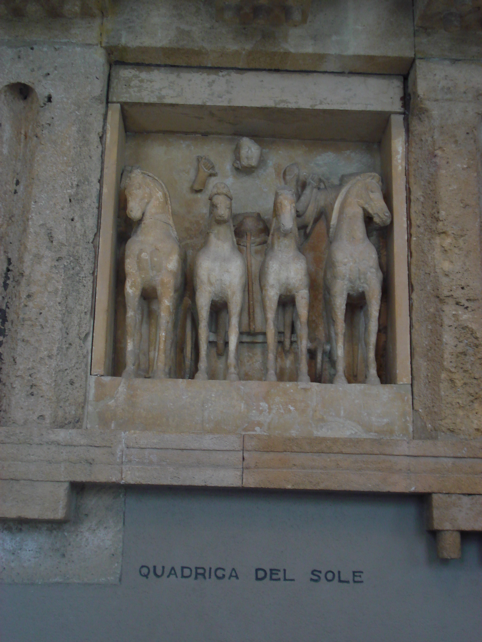 Dal Tempio C di Selinunte: quadriga di Helios (il Sole). Sec. VI a.C. Museo archeologico regionale di Palermo, 28 settembre 2006. Foto di Giovanni Dall'Orto.